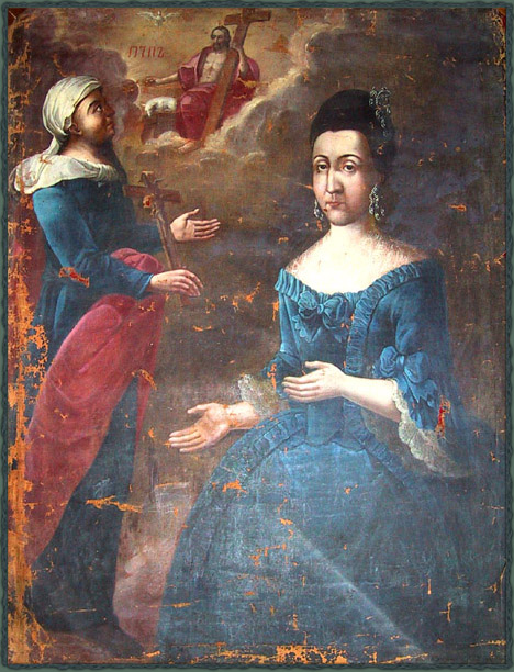 Портрет работы неизвестного художника хранится в Тульском музее изобразительных искусств (Россия)